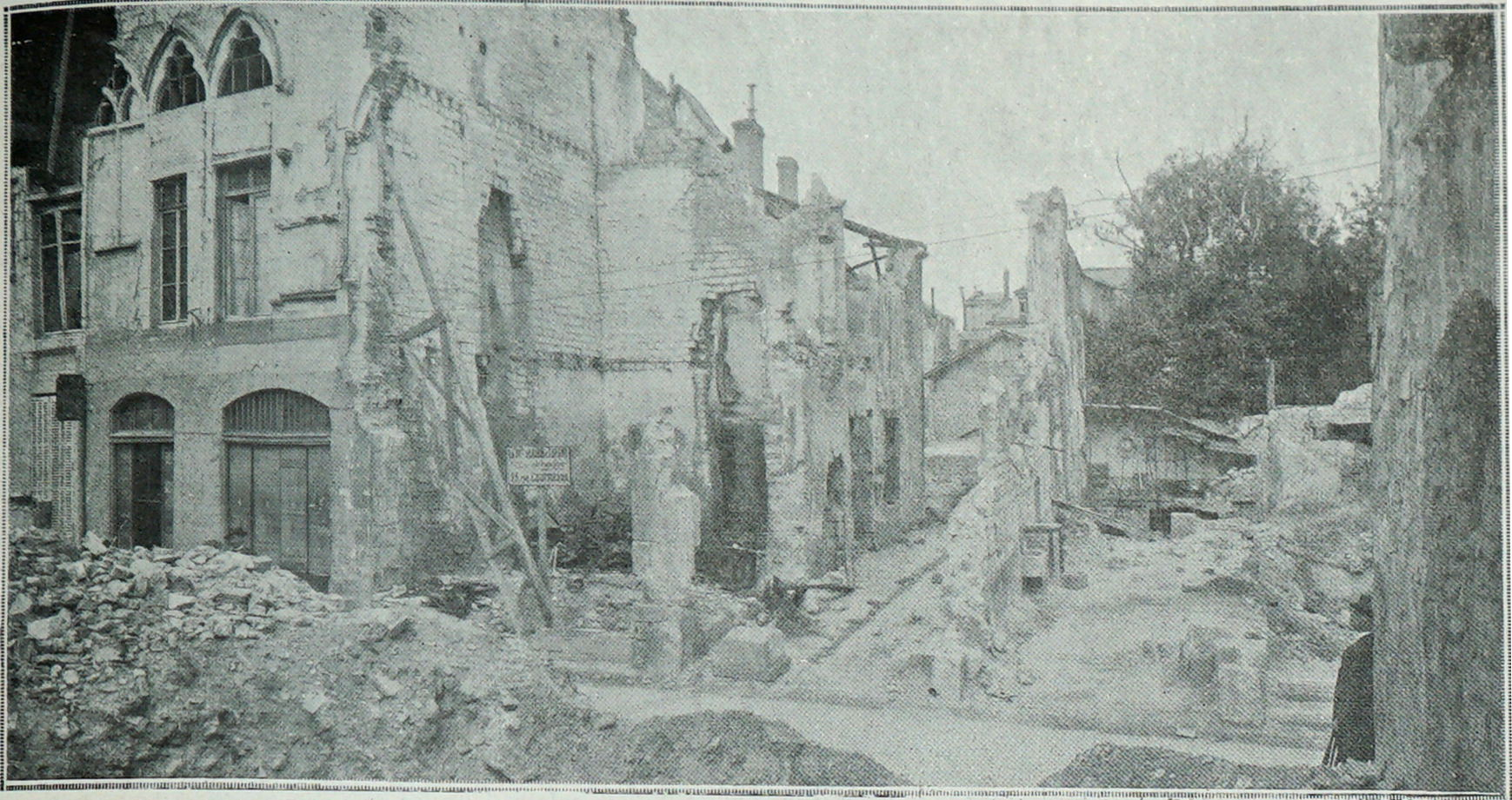 les deux façades sur la rue du Tambour, celle de la "maison des comtes de Champagne" et celle disparue de la maison des musiciens dont on aperçoit les ruines jusqu'au jardin ; issue de l'almanach de 1910.